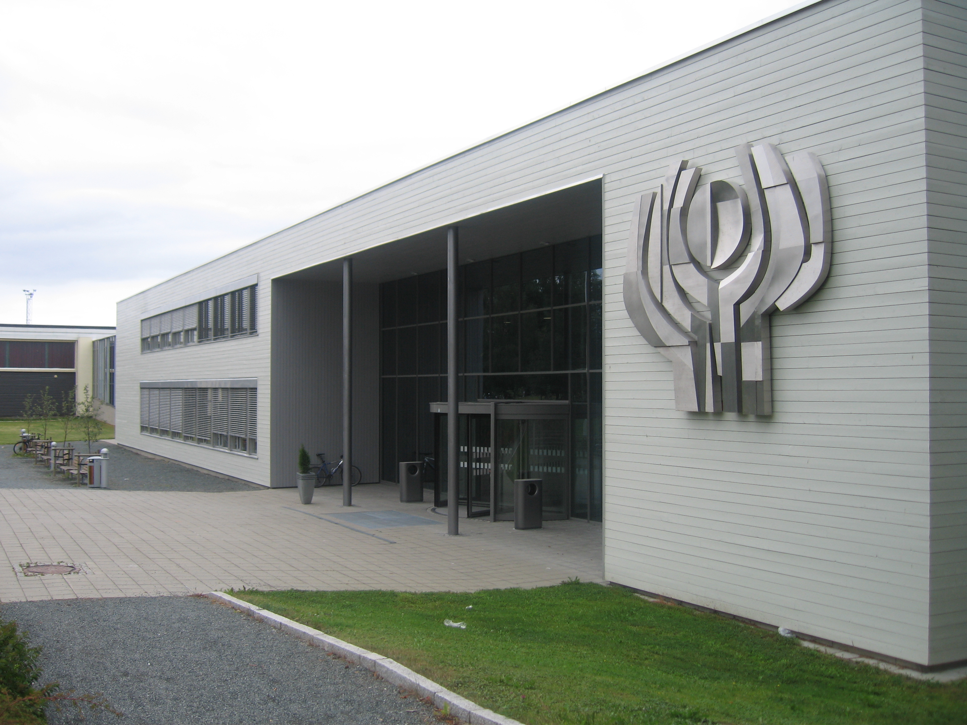 Levanger vdrg.